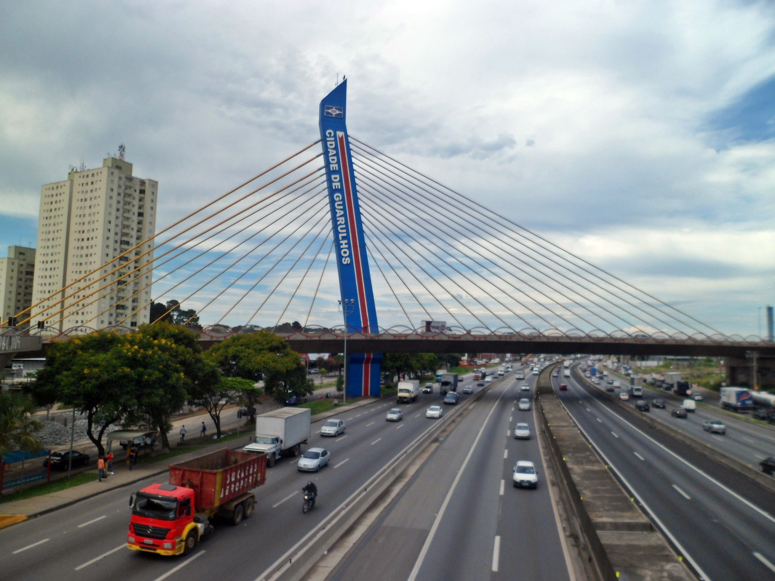 Ponte de Guarulhos, construída sobre a Rodovia Presidente Dutra (BR-116; SP-60).